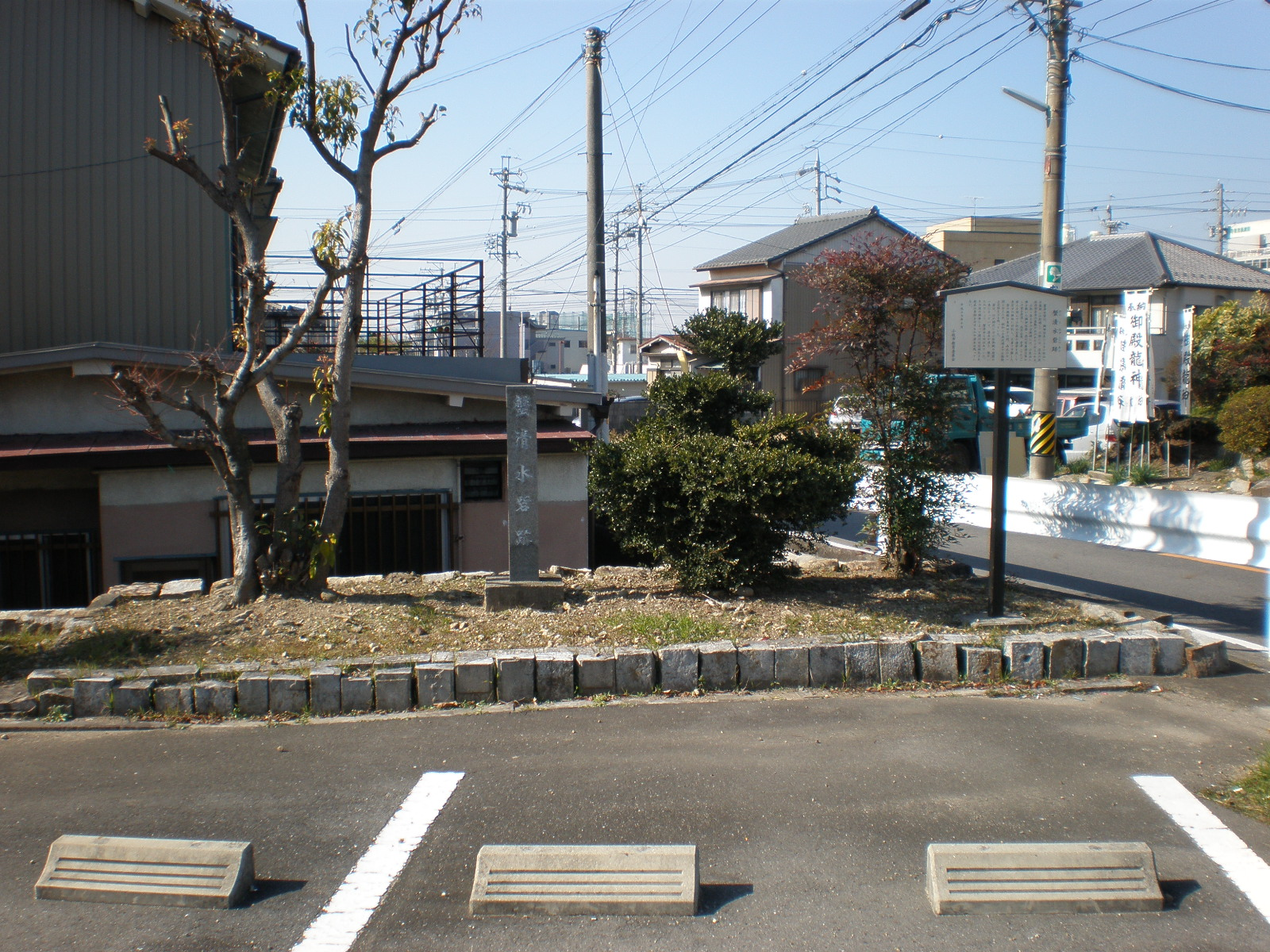 愛知県小牧市にある蟹清水砦跡